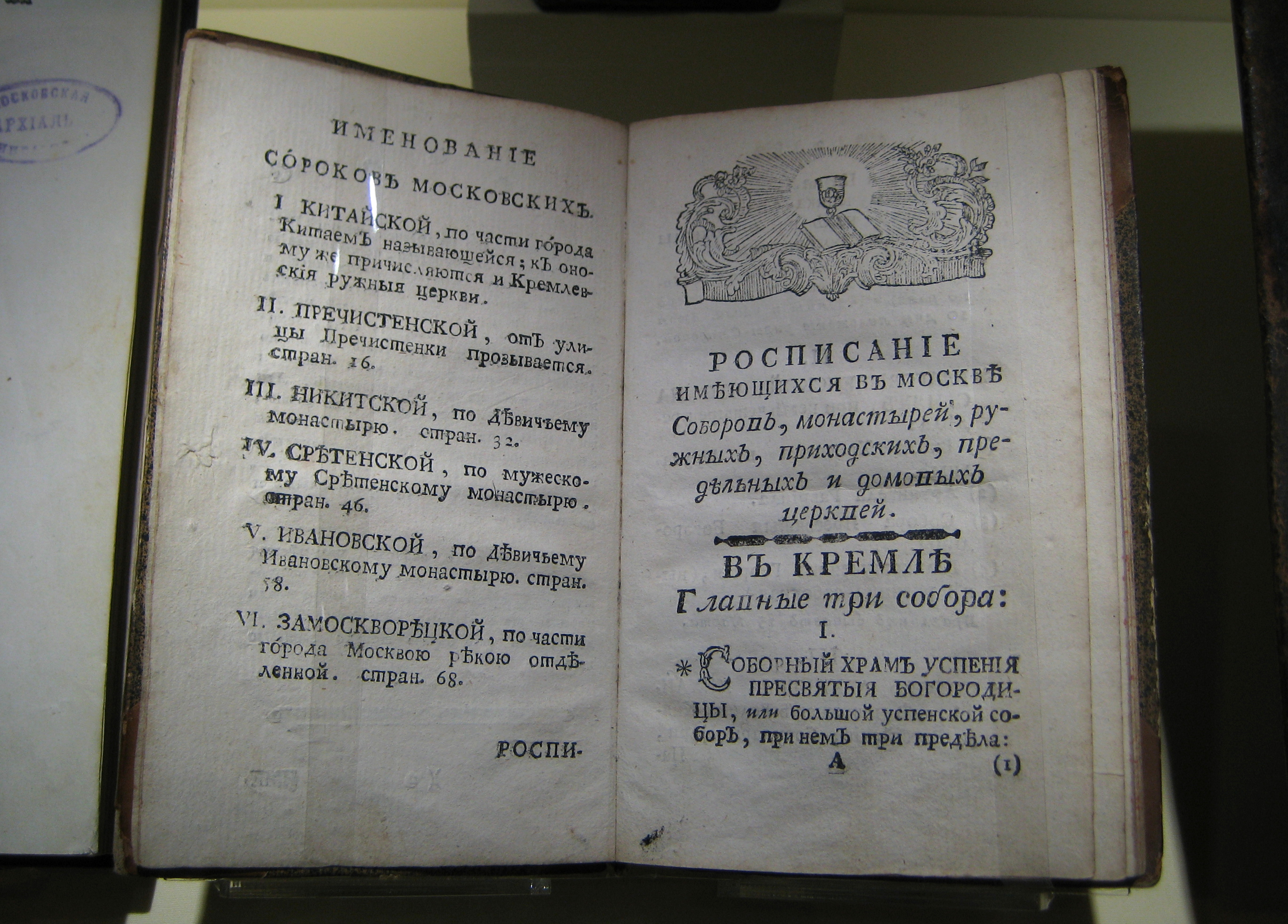 Музей "Бородинская панорама"